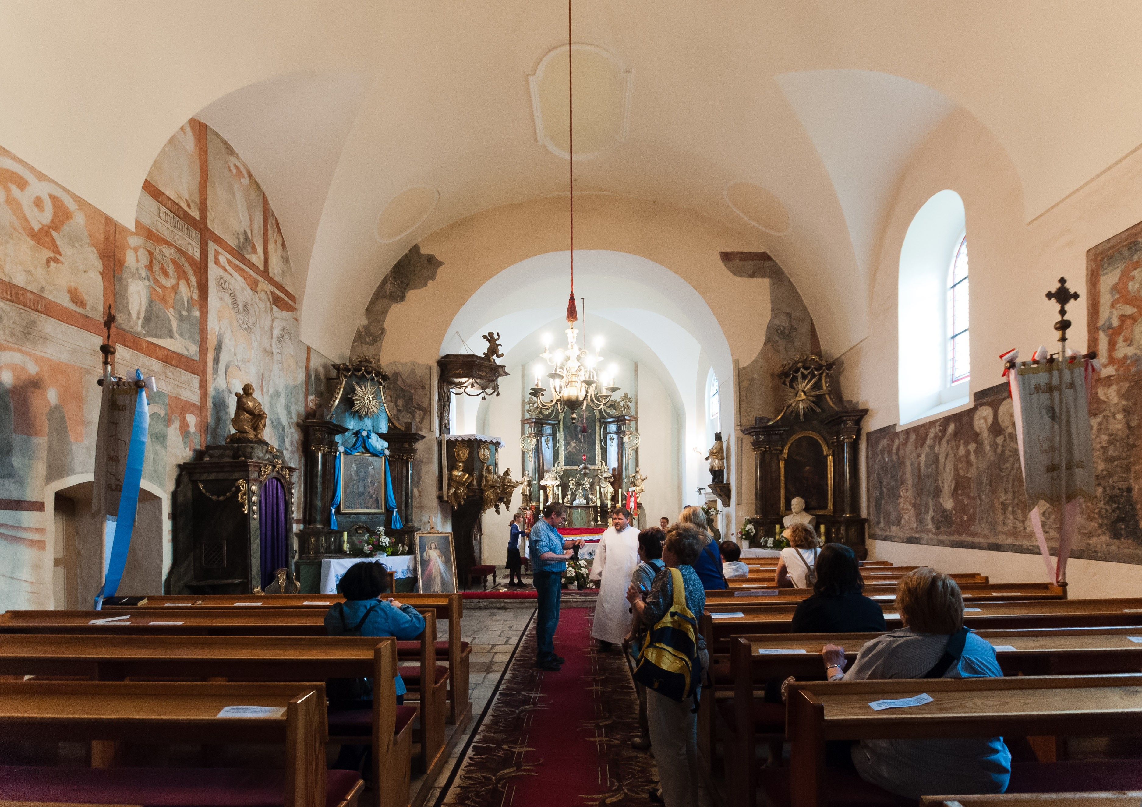 Kościół pw. św. Jerzego, z ok. 1300 r. w Hajdukach Nyskich - wnętrze.